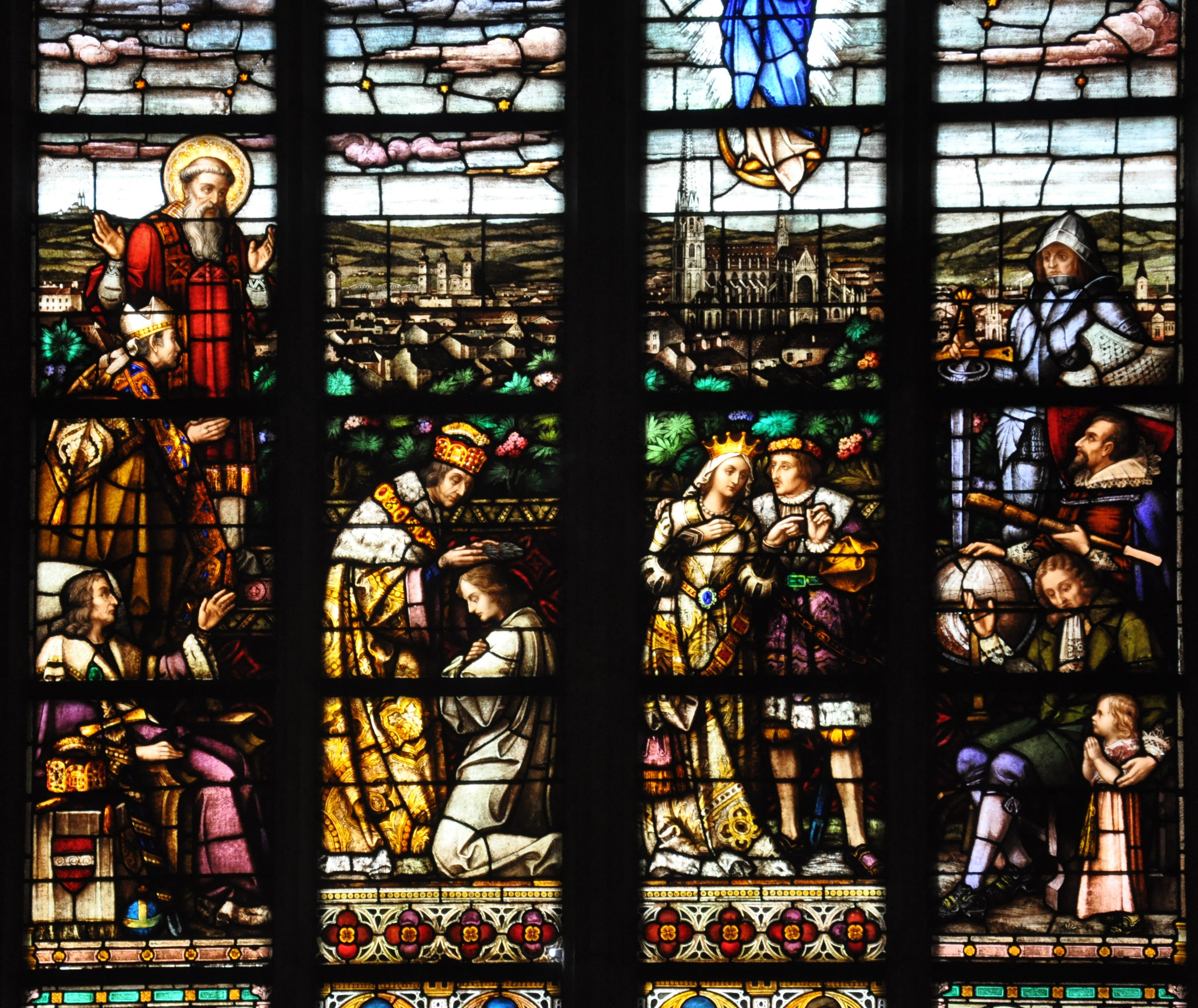 Linz, Neuer Dom, Glasfenster "Linz" (Böhm-Führer Nr. 12)